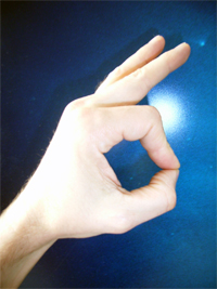 ok-fingerzeichen